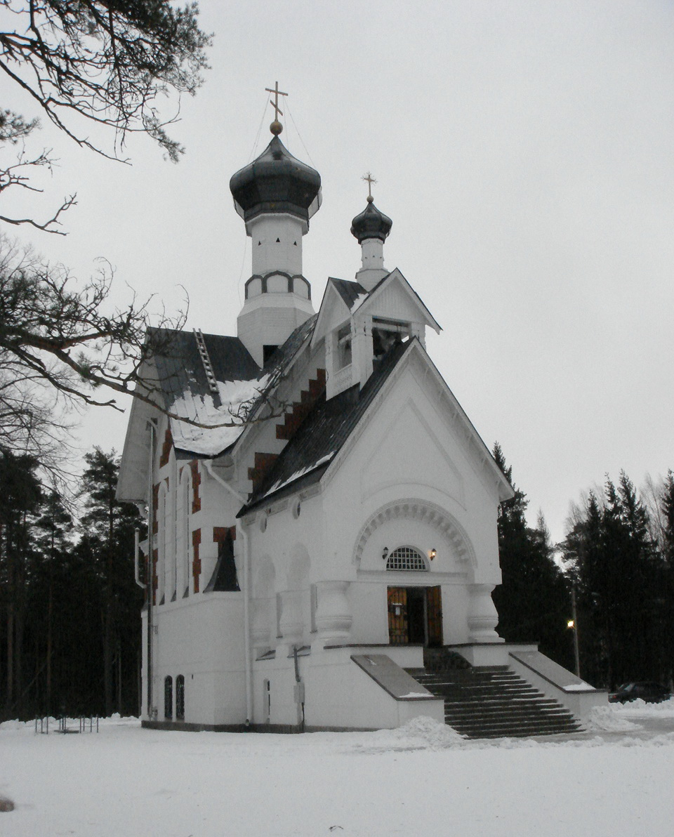 Церковь благоверного князя Александра Невского (Санкт-Петербург и Лен.область, Выборгский район, посёлок Сосновый Бор)